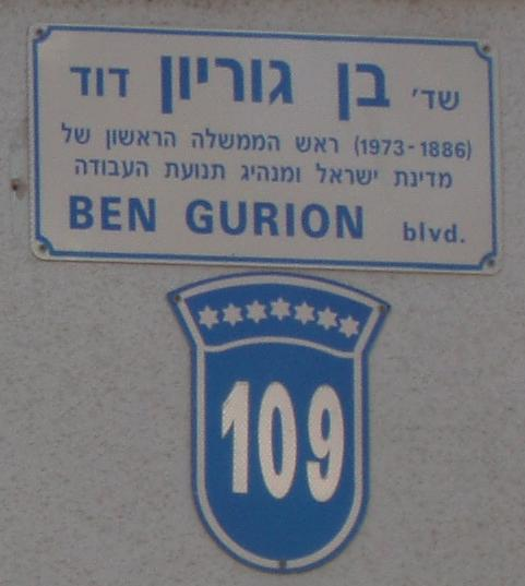 שלט רחוב